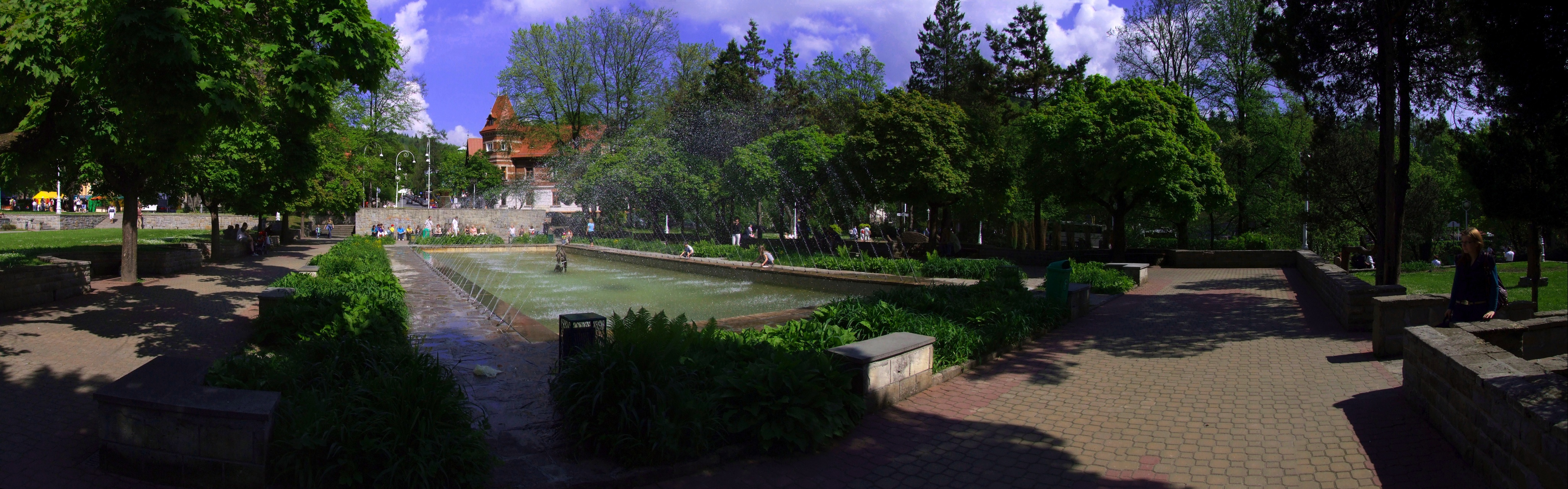 Park z fontanną w Krynicy